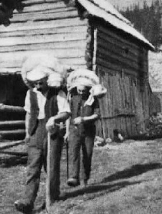 Sir nesejo v dolino.